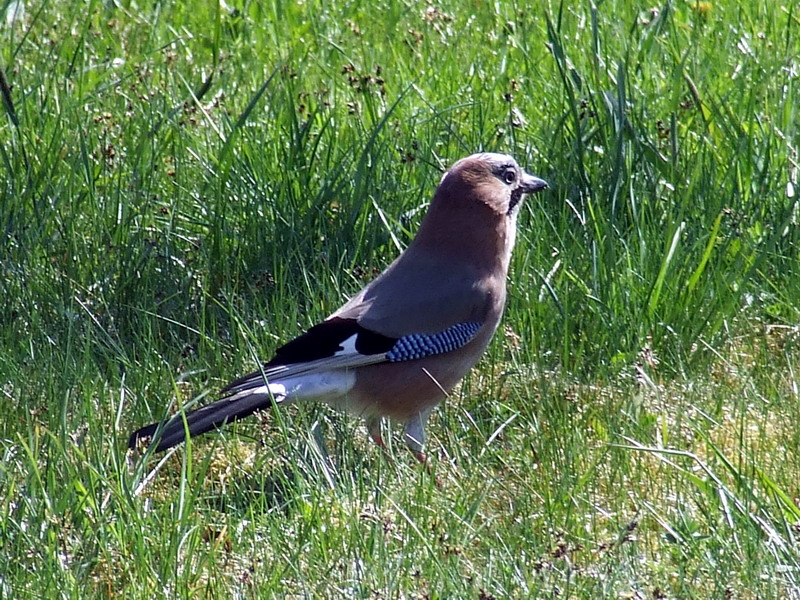 Garrulus glandarius. Veseluvka, Jonava district, Lithuania.